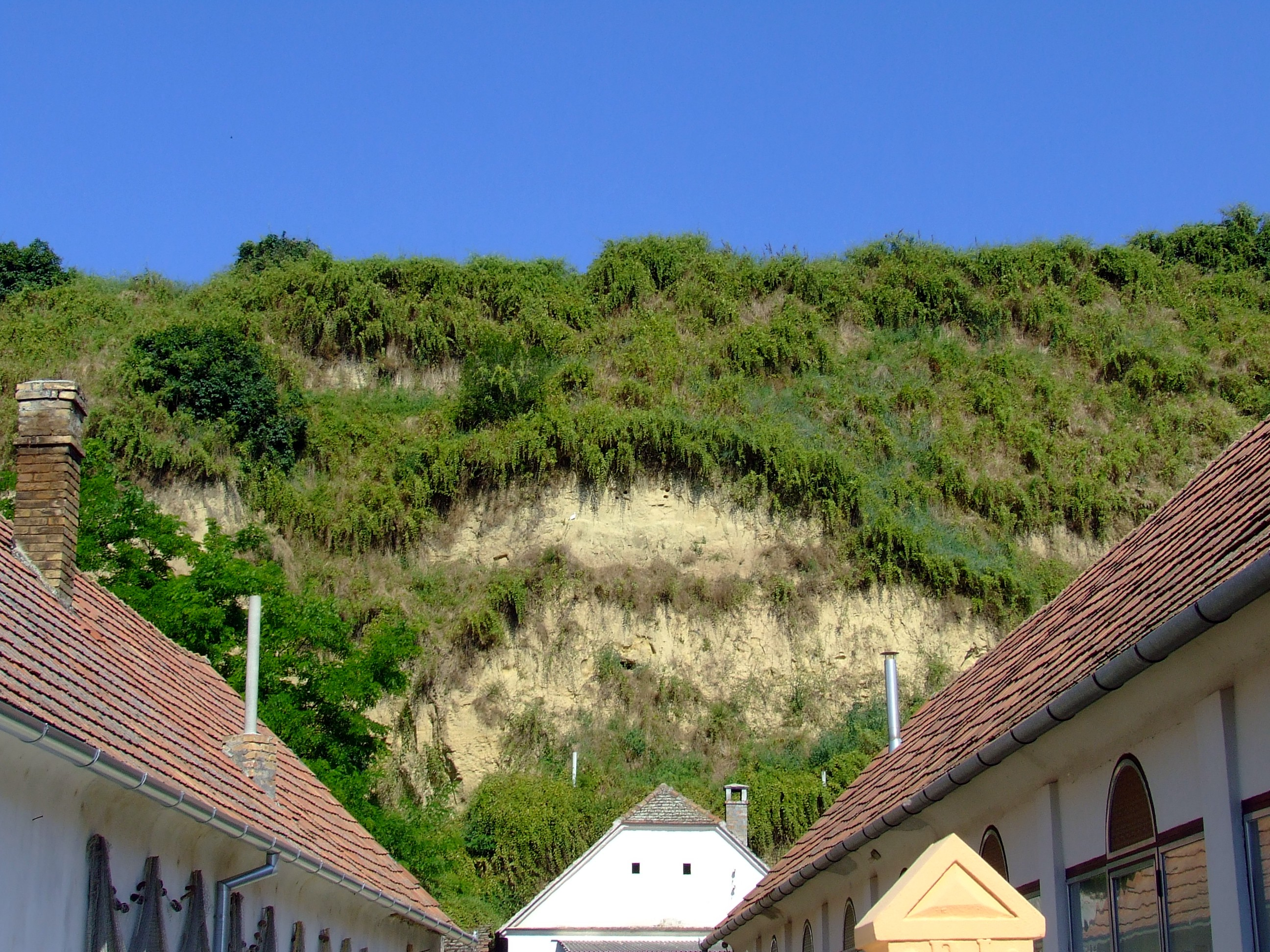 Löszfal Dunaszekcsőn